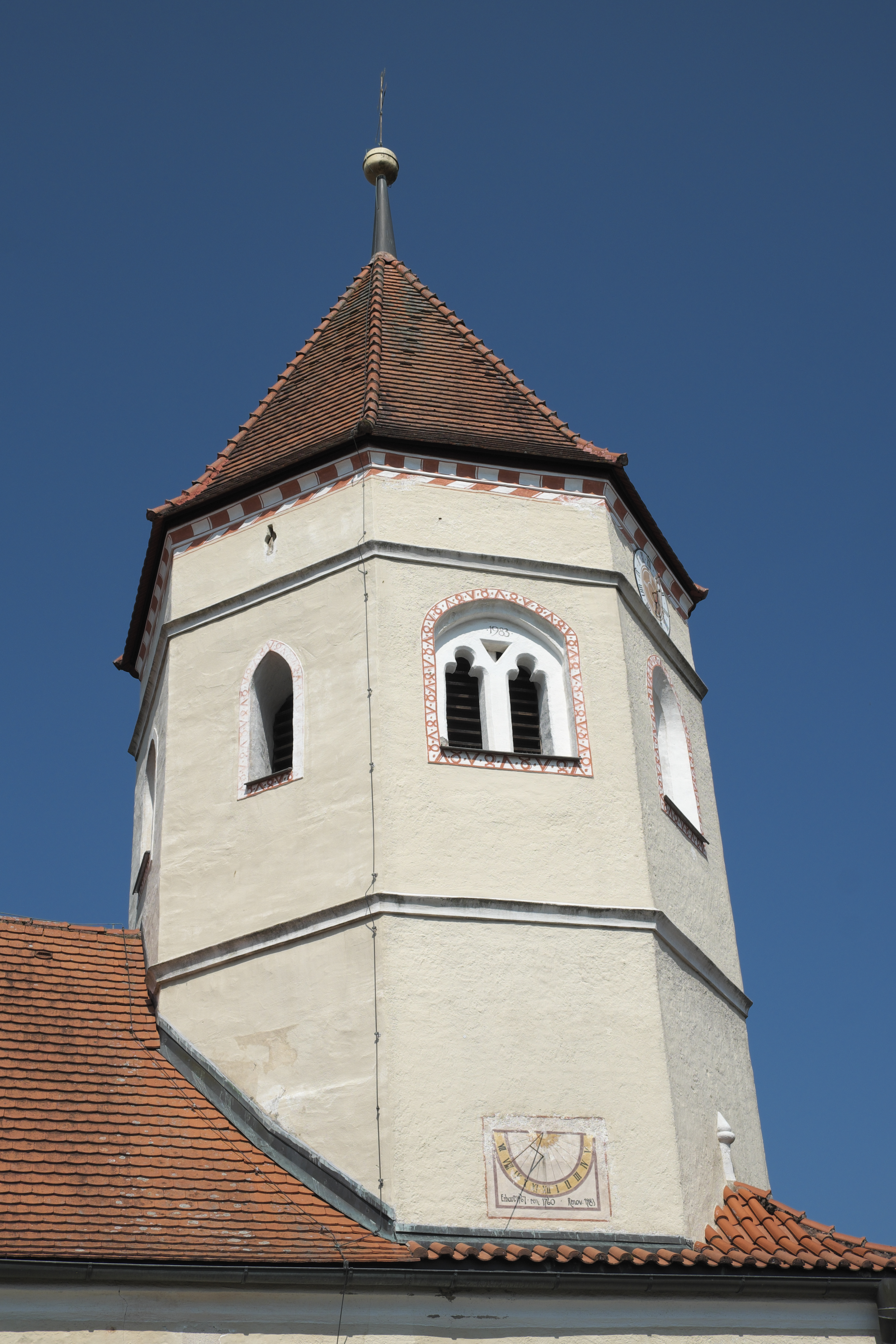 Alte katholische Pfarrkirche St. Georg in Oberpfaffenhofen (Weßling) im Landkreis Starnberg (Bayern, Deutschland), Glockenturm